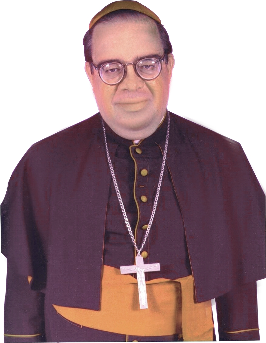 Obispo Diócesis de Punto Fijo